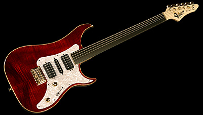 Vigier Fretless guitar